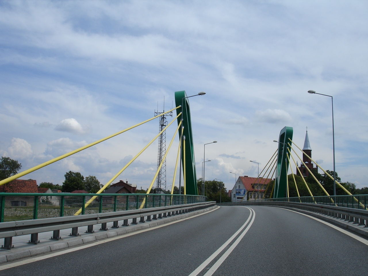 Skorogoszcz - new bridge